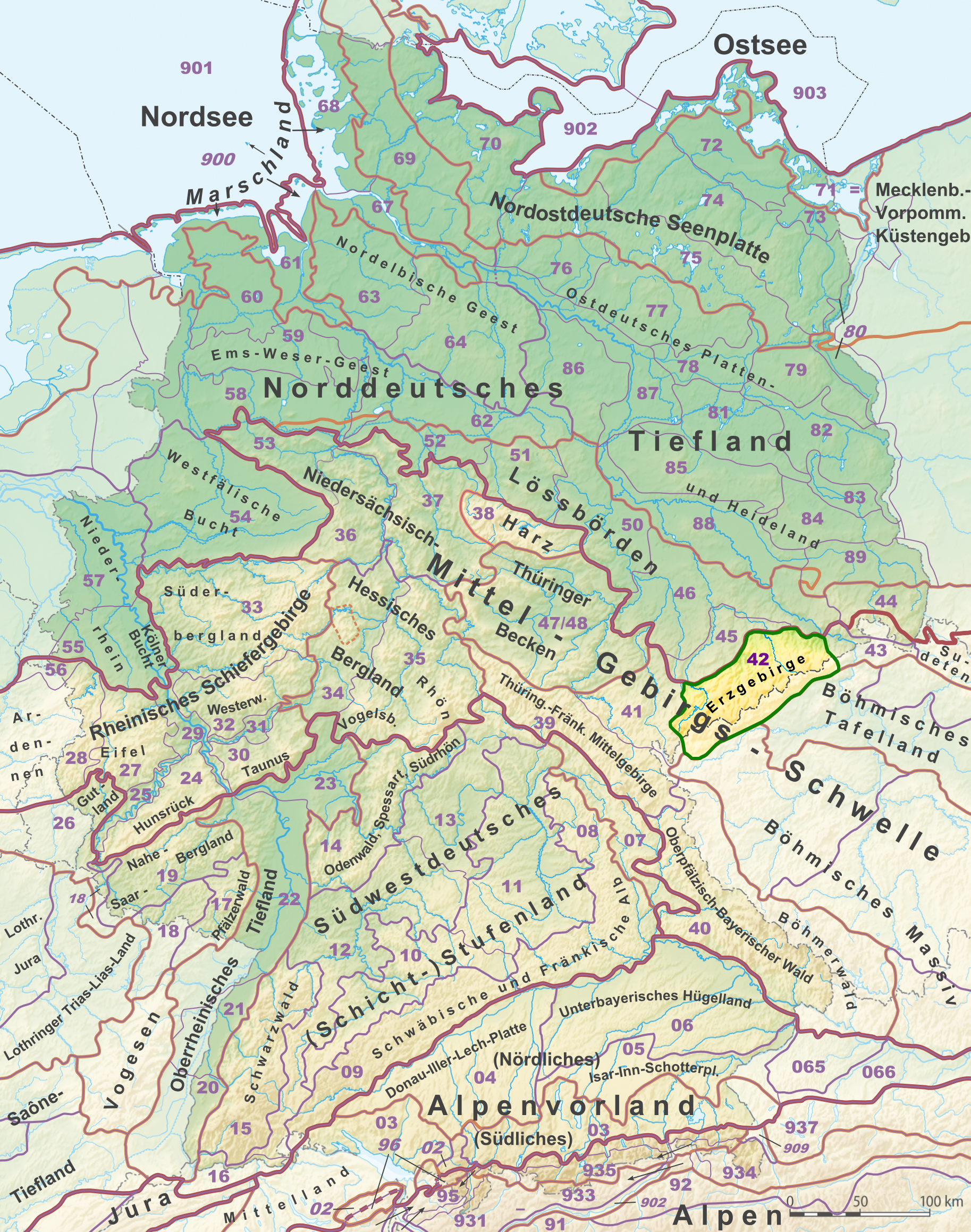 Das Erzgebirge (grün umrandet und in leuchtendem Farbton) auf der Karte der Naturräumlichen Großregionen Deutschlands; Großregionen 3. Ordnung nach dem Handbuch der naturräumlichen Gliederung Deutschlands. Beschreibung siehe File:Naturraeumliche Grossregionen Deutschlands plus.png.